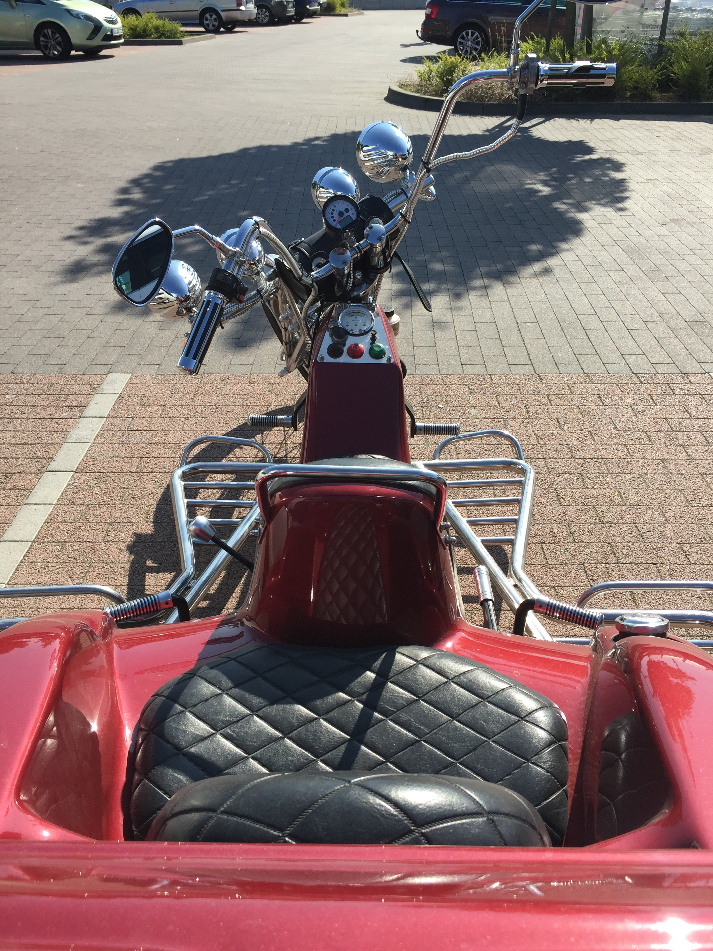 Blick auf Trike-Fahrersitz